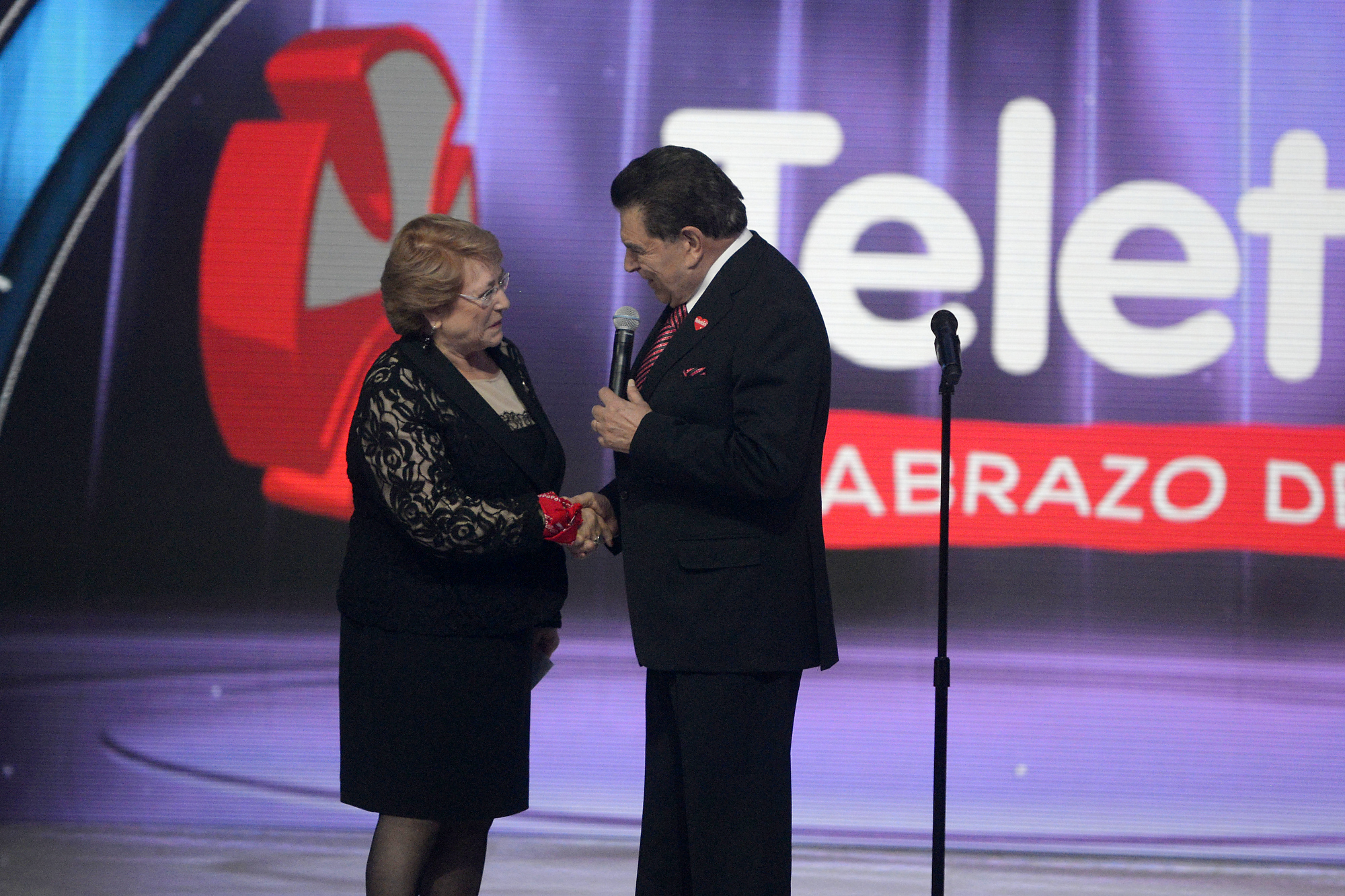 02 Diciembre 2016, Ministra Paula Narváez asiste a ceremonia de inauguración de Teleton 2016.